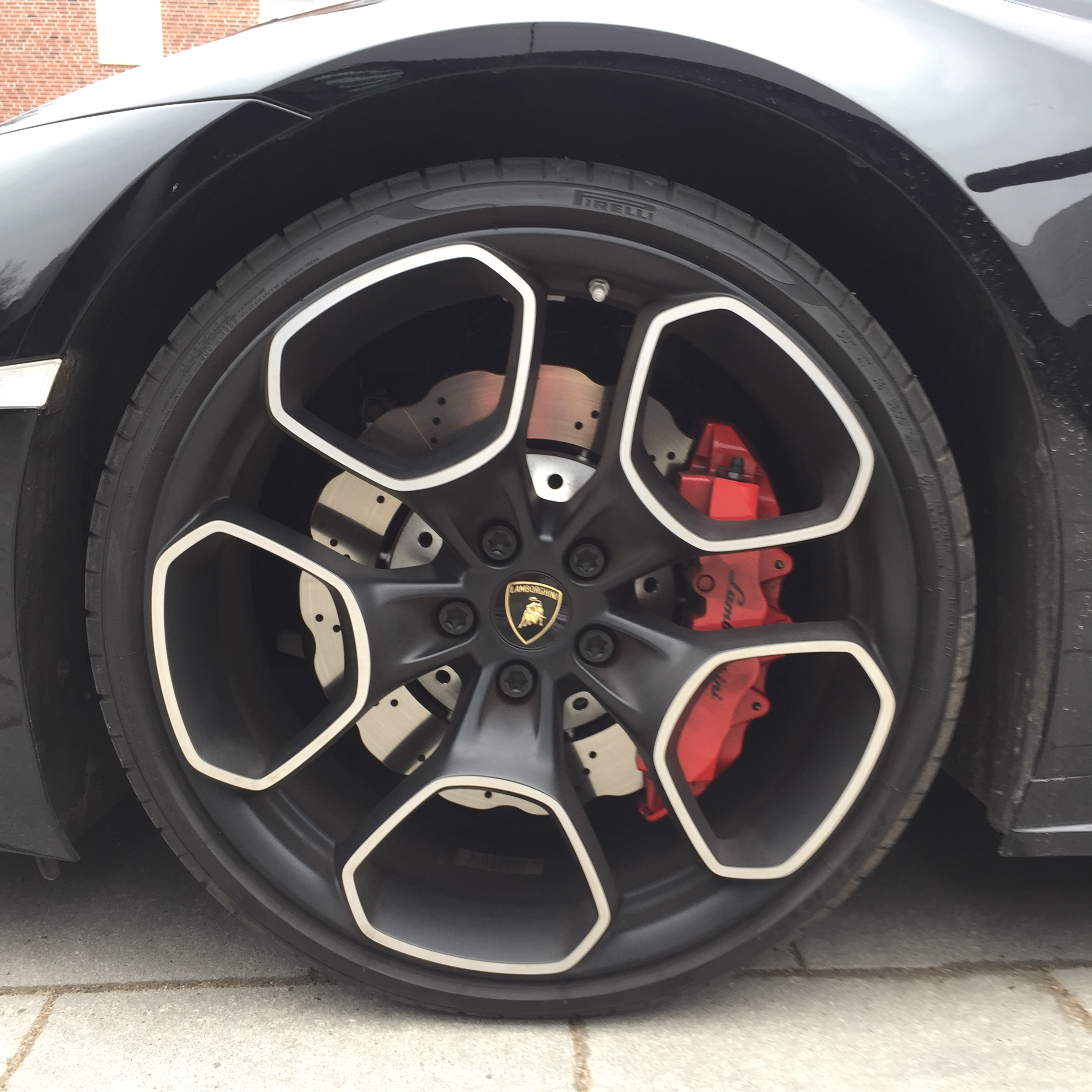 Lamborghini Huracan Bremsanlage